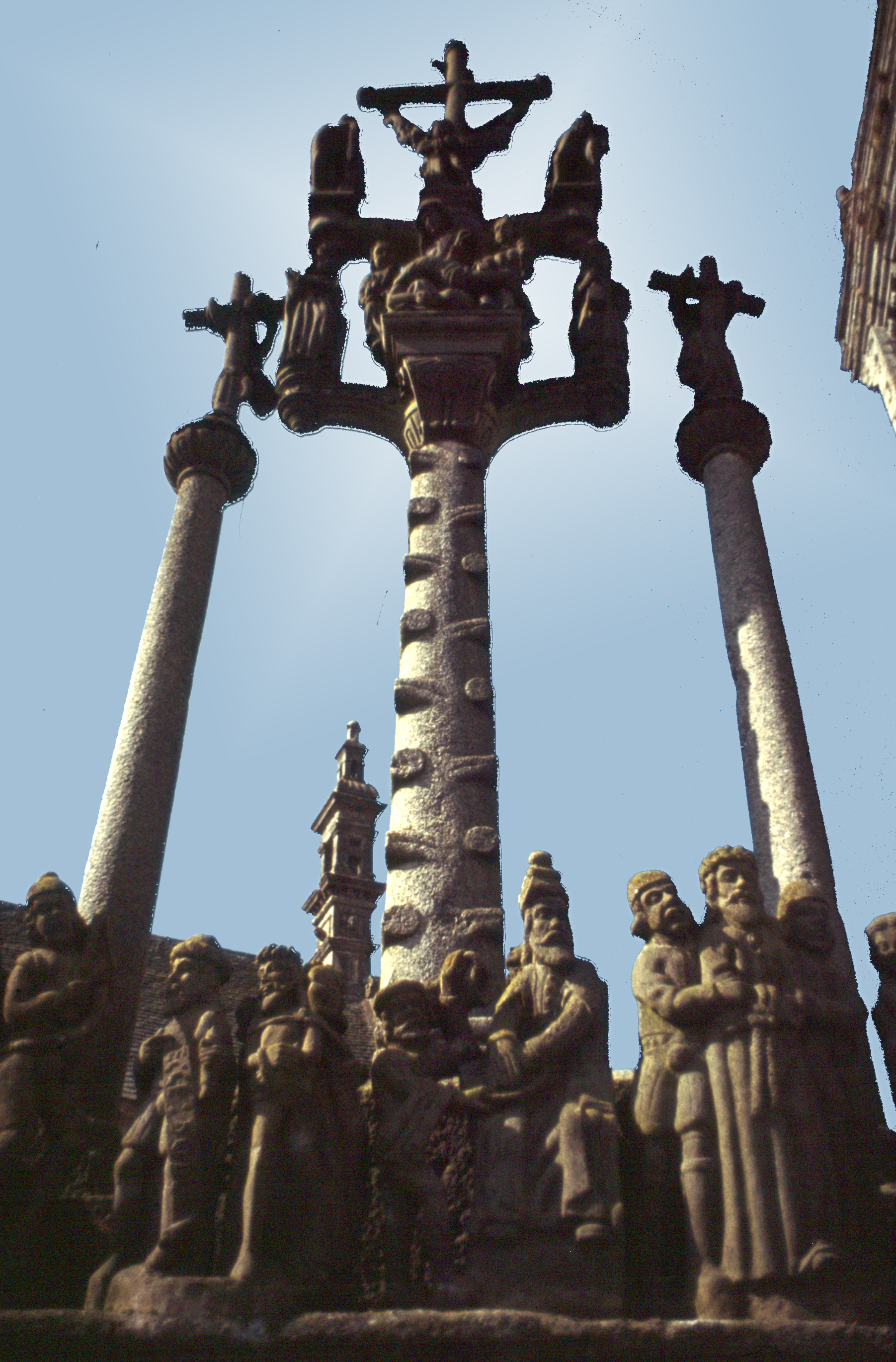 Saint-Thégonnec